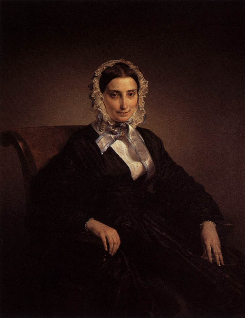 Depicted person: Teresa Manzoni Stampa Borri